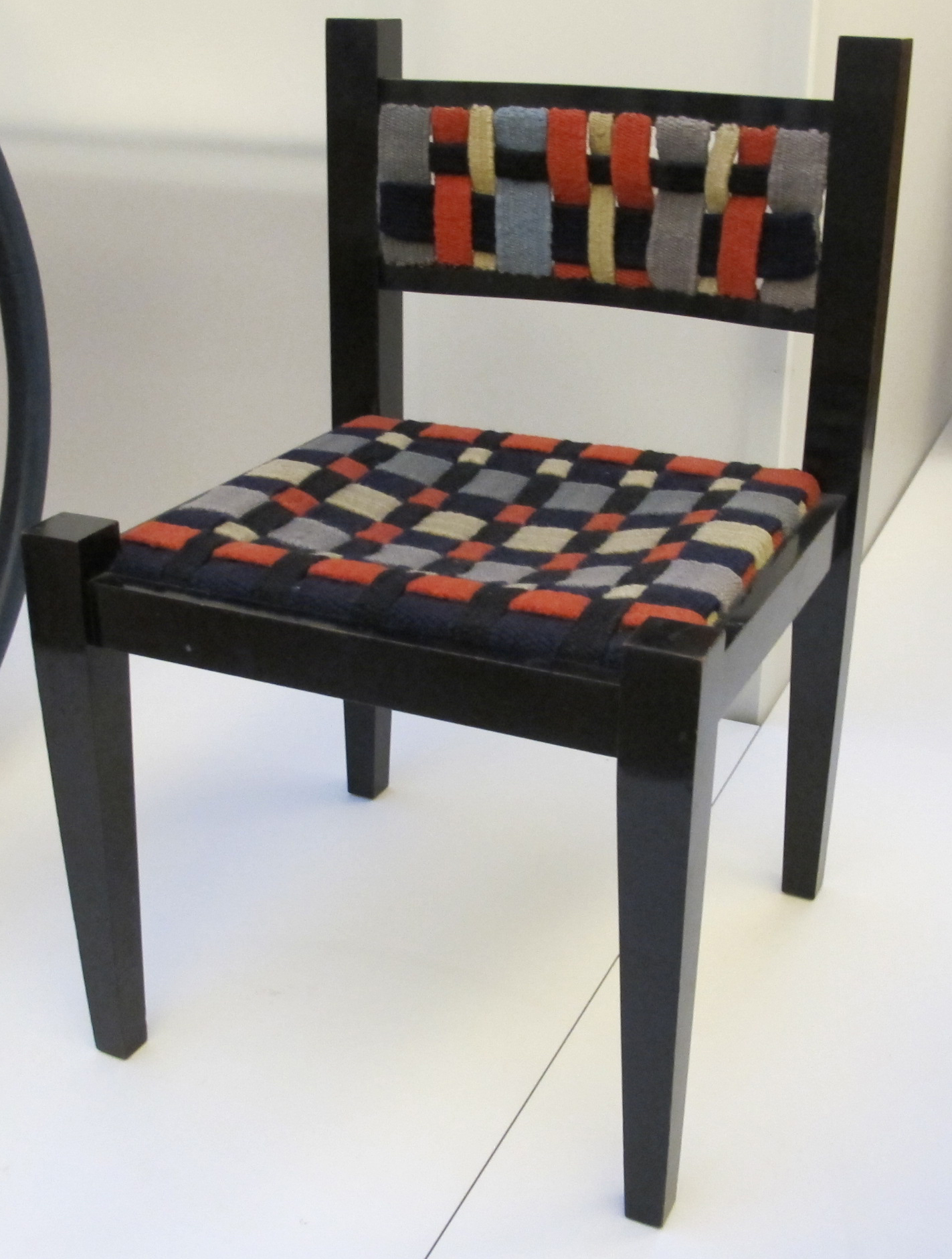 Marcel breuer con stoffe di gunta stölzl, sedia, 1922